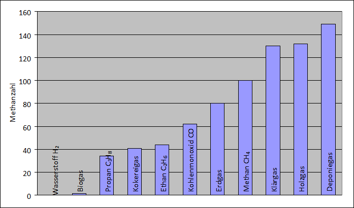 Methanzahl verschiedener Gase